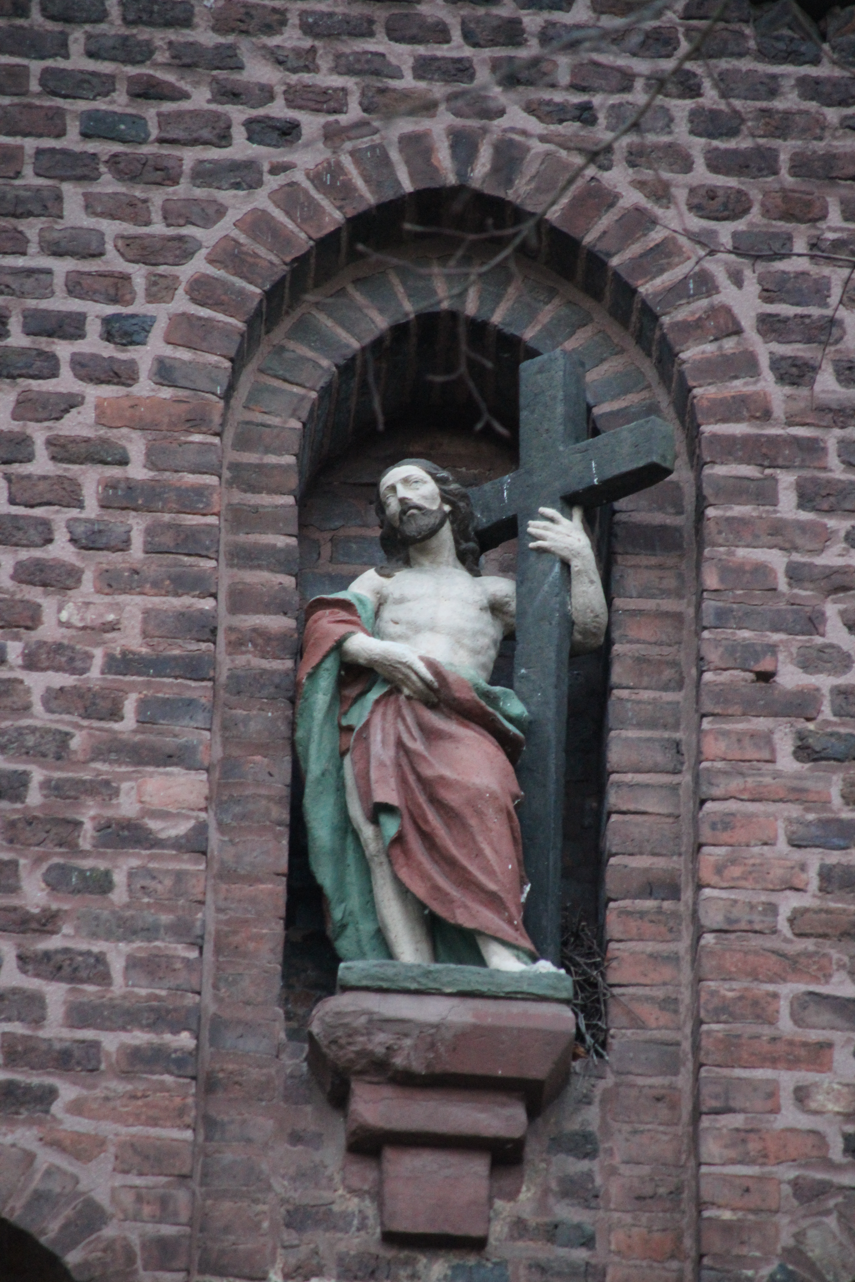 Figur des Auferstandenen Christus an der Ostwand der Sakristei der Pfarrkirche von Niederzier-Ellen.